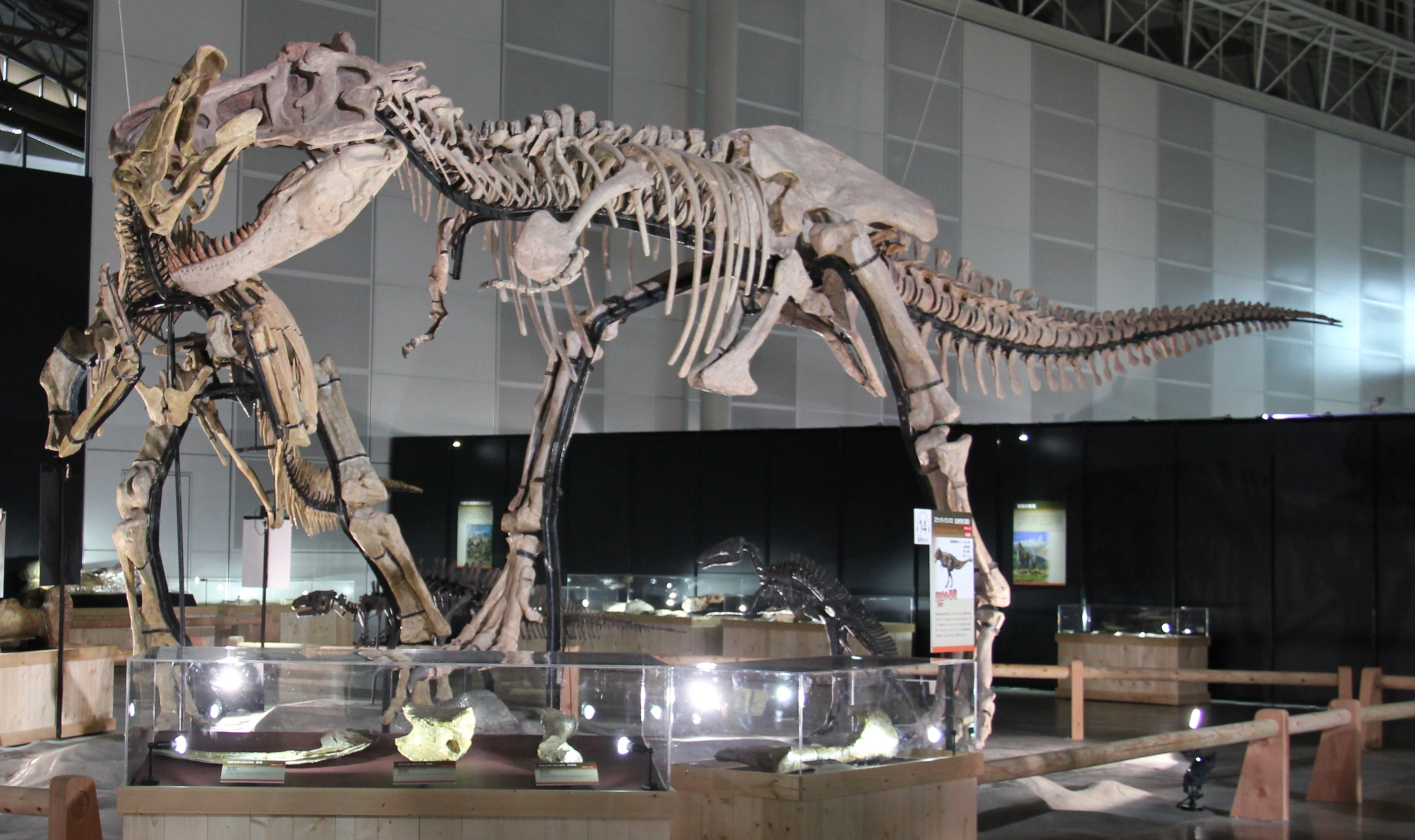 Dino Kingdom 2012